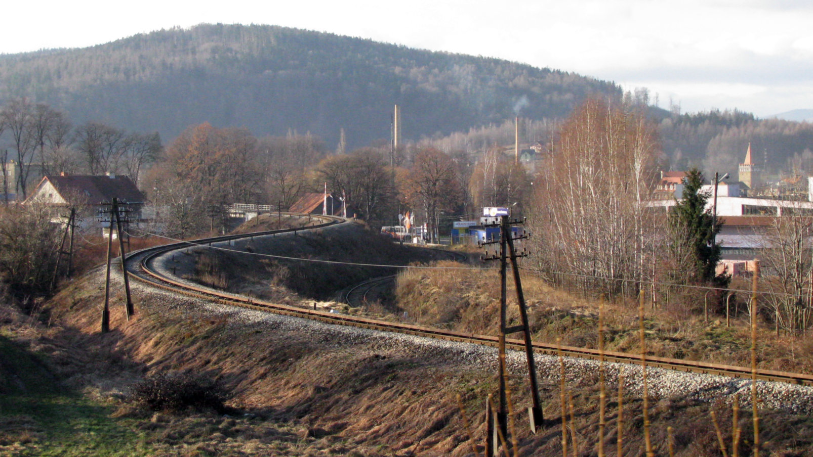 Dołem do zdroju, górą w Jeseniki. Zima 2012/13